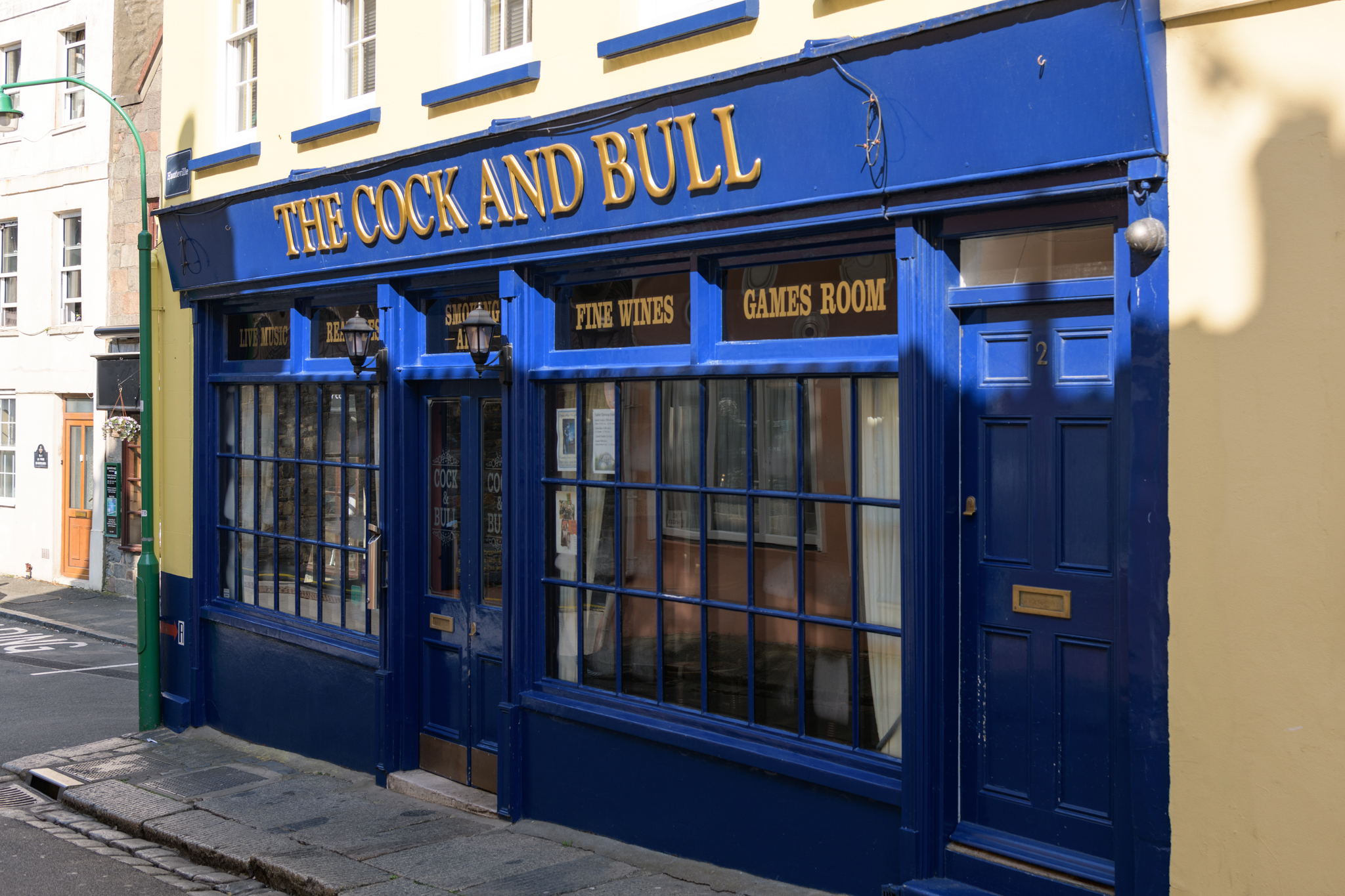 St-Peter Port, Guernesey